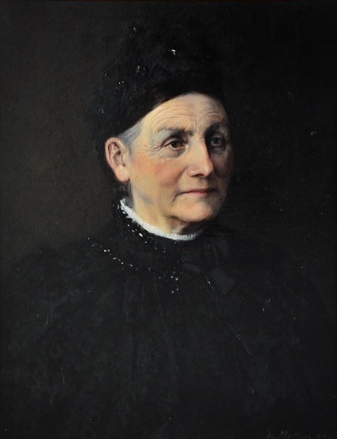 Louise Christiane Sophie Jung geb. Schmidt (1827–1906), Ehefrau von Gustav August Jung (1824–1904) und Mutter von Gustav Jung. Ihre Vorfahren sind höchster Adel bis zum Rurikiden Wladimir I.. Eine Vorfahrin heiratete in der Reformationszeit einen protestantischen Pfarrer.